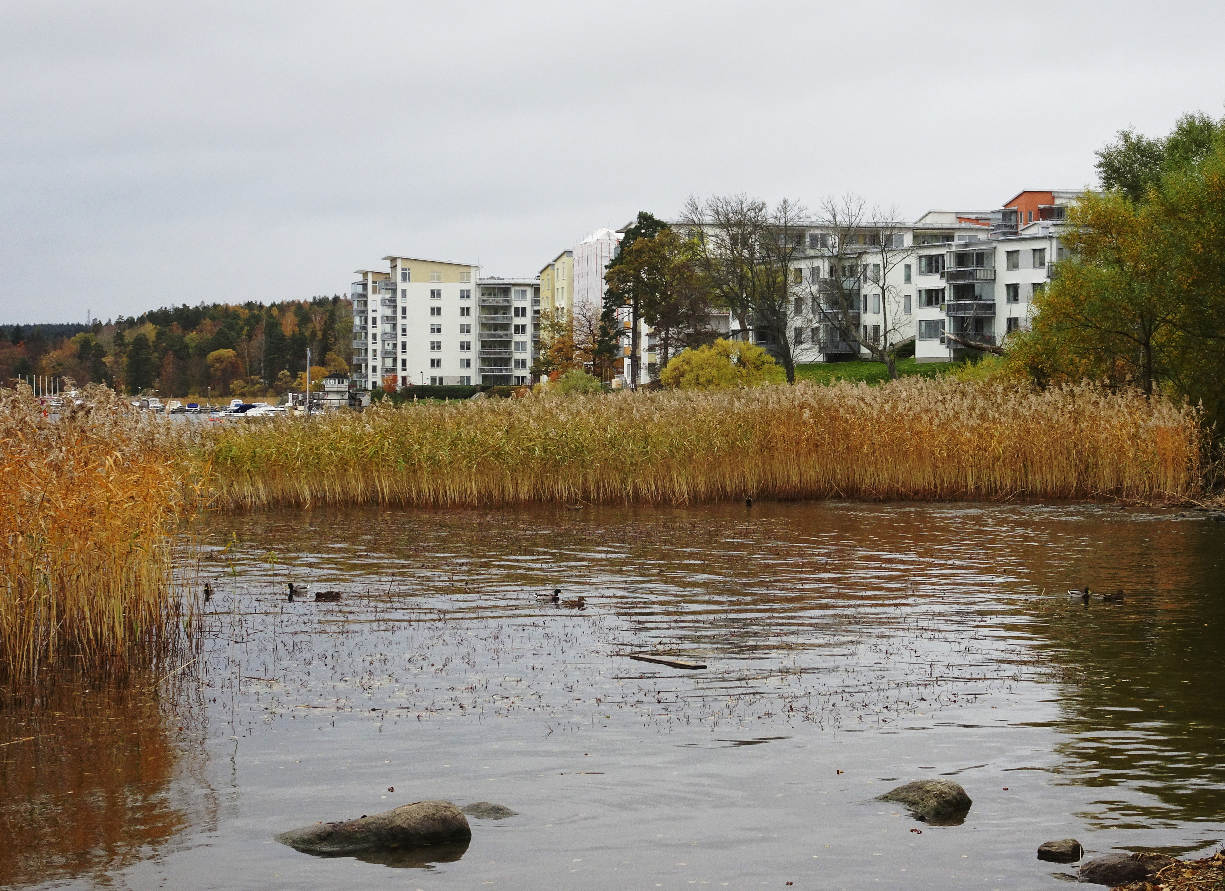 Bostadsområdet Bolinder Strand i Kallhäll